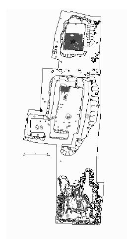 Hvalveiðistöðin á Strákatanga